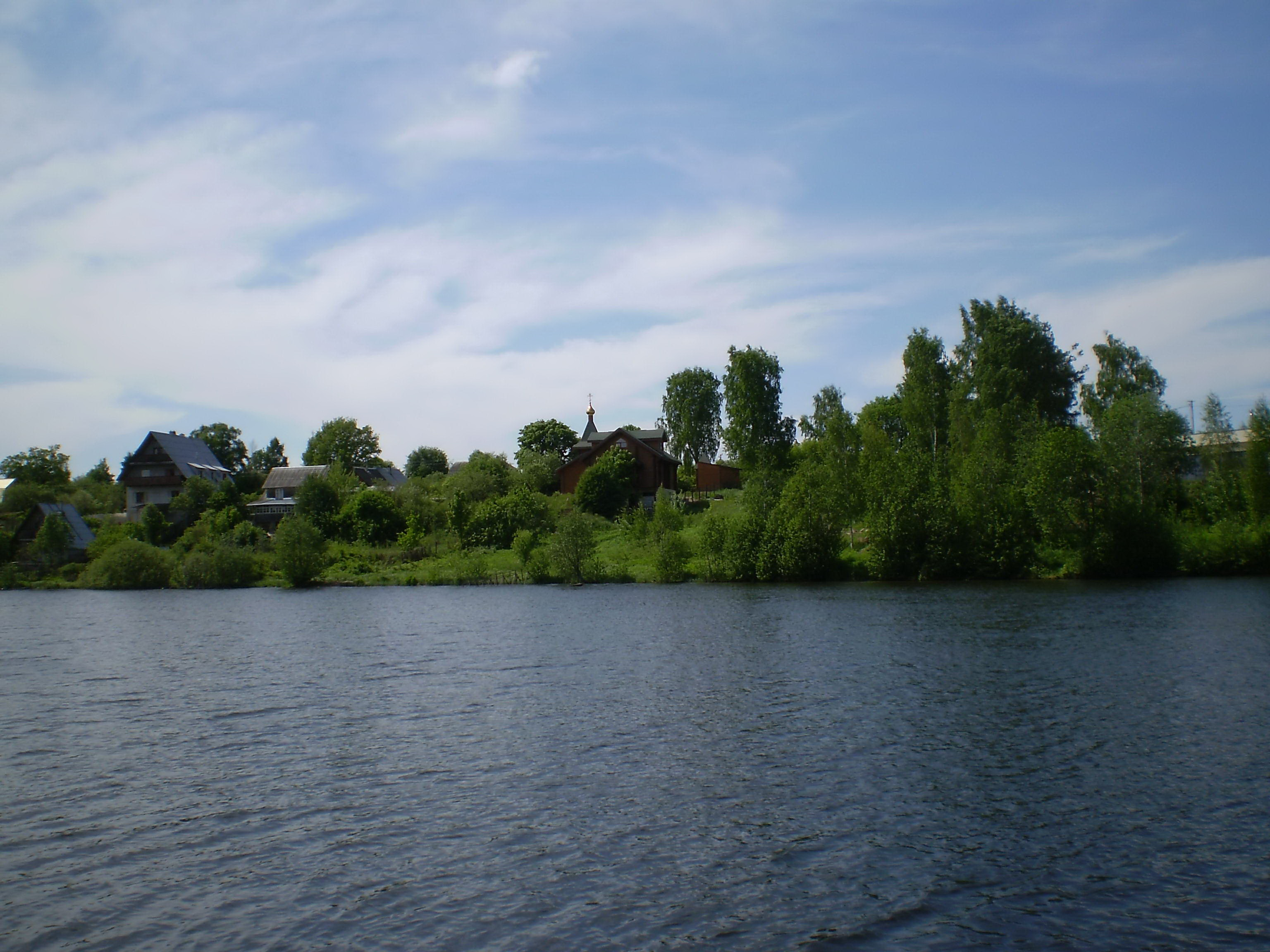 1-е Ждановское (устар. Симоново) озеро.